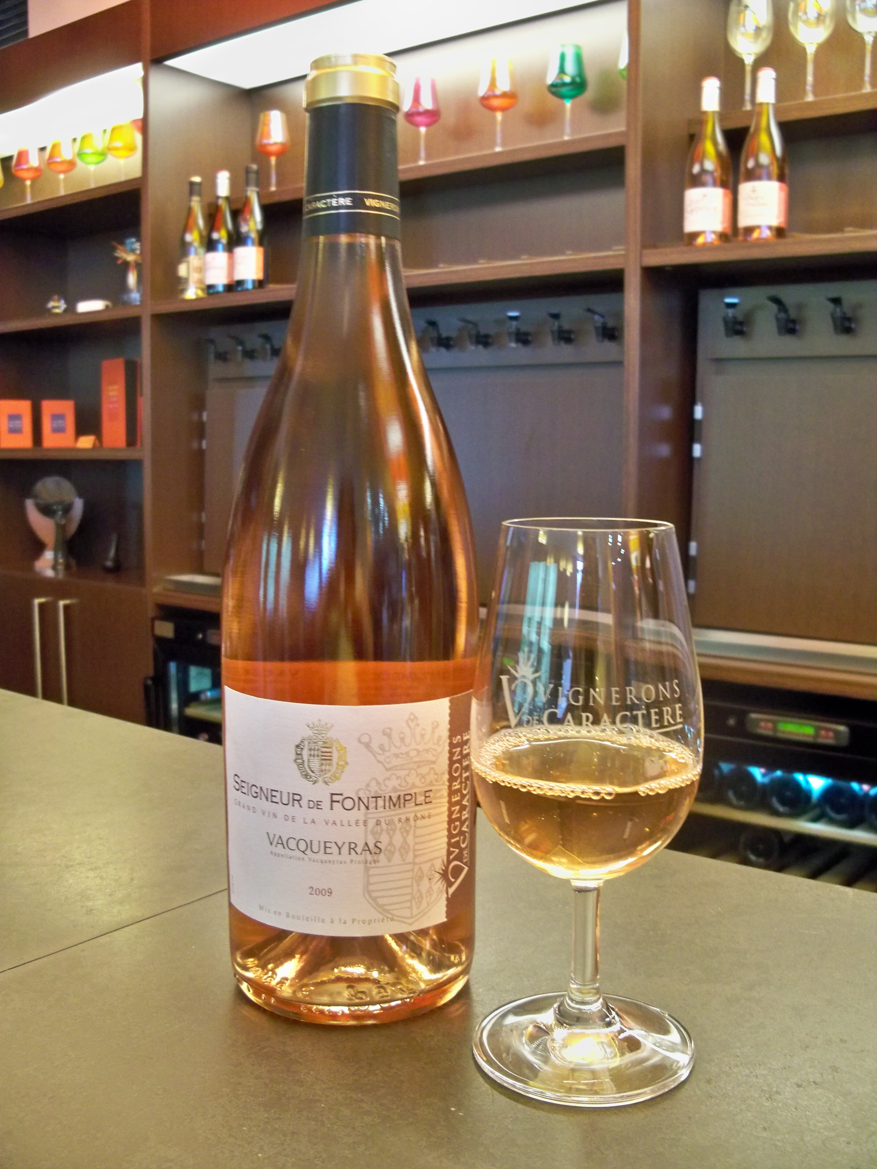 Bouteille de rosé d'AOC Vacqueyras